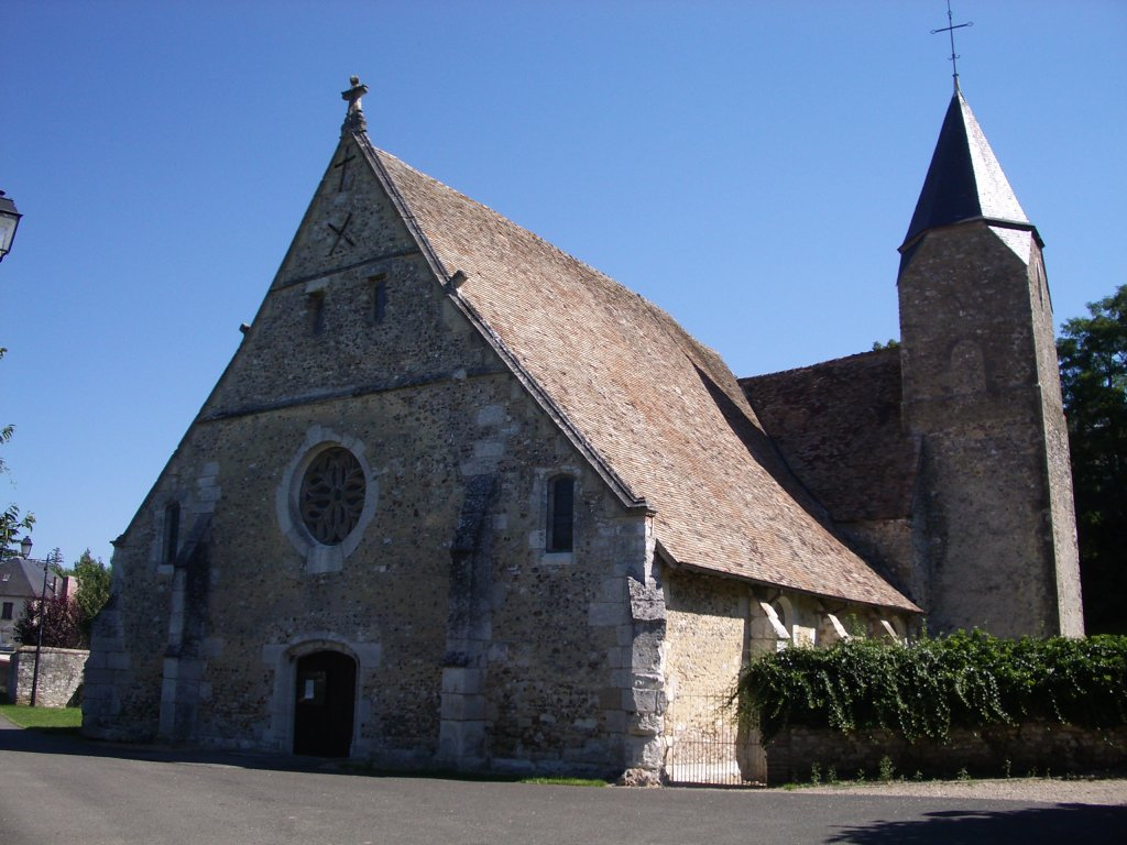 Eglise de Chambray (Eure)